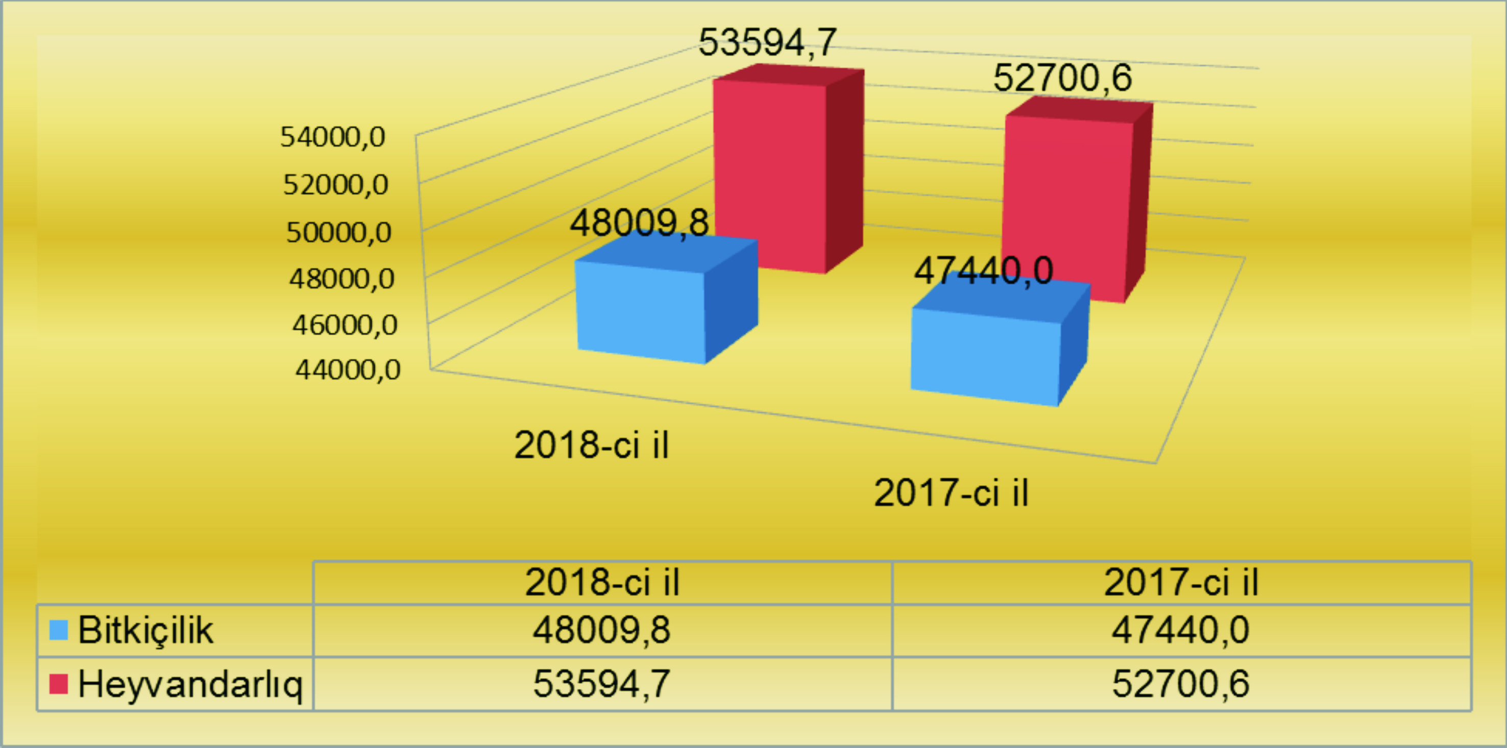 Neftçala rayonunda kənd təsərrüfatının ümumi məhsulunun strukturu